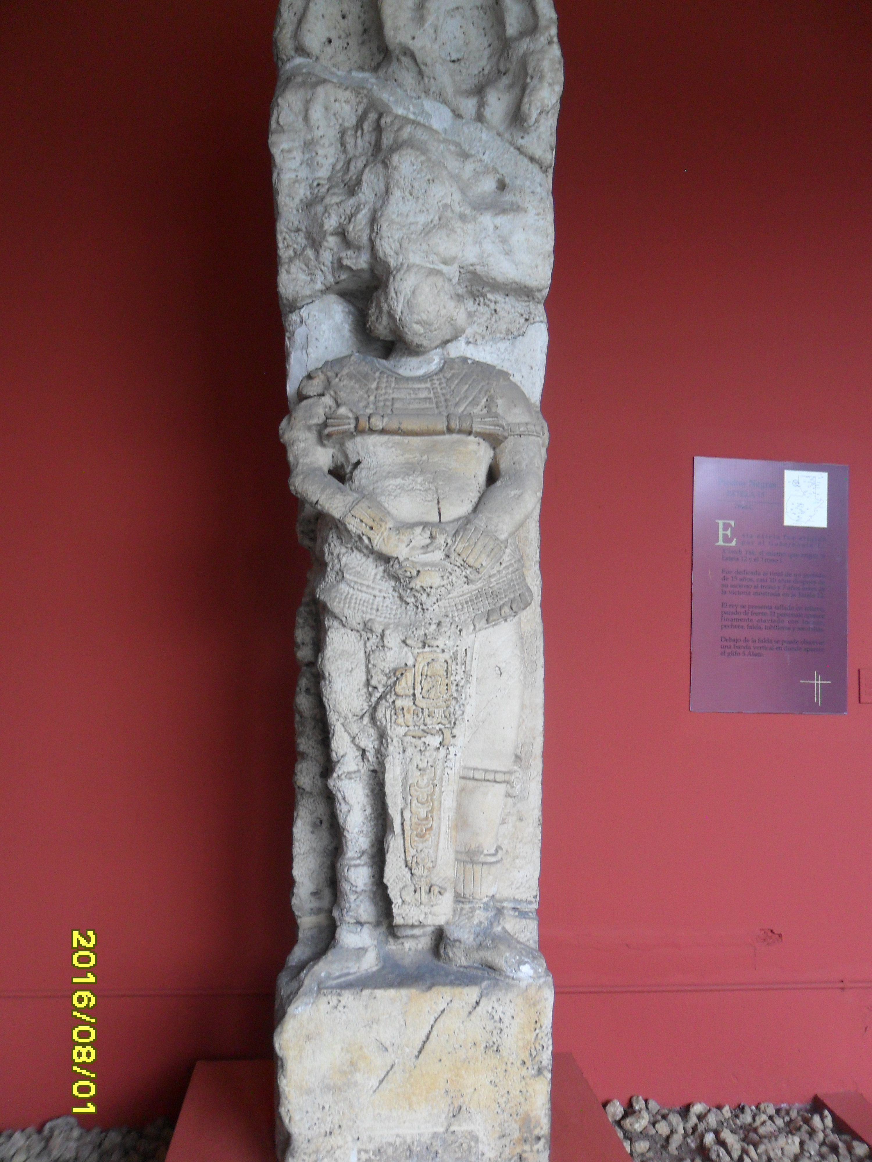 Estela 15 Piedras Negras, Guatemala. Museo Nacional de Arqueologia